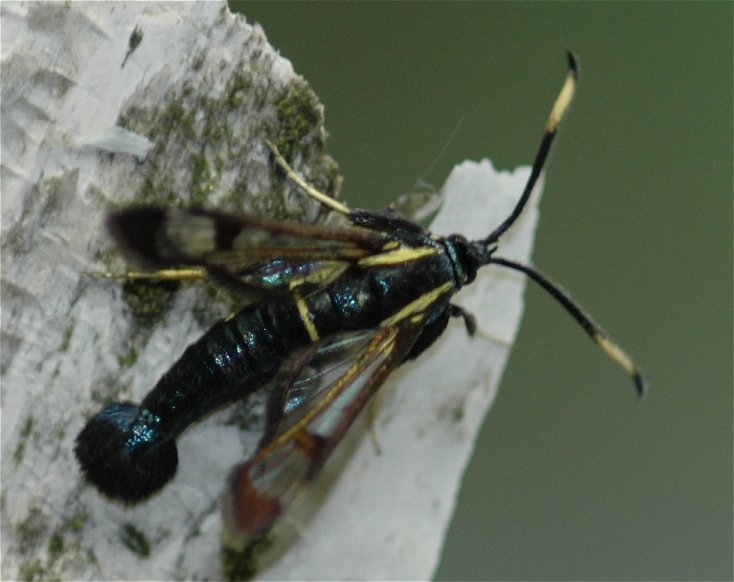 Synanthedon spheciformis Gern. (Erlenglasflügler)